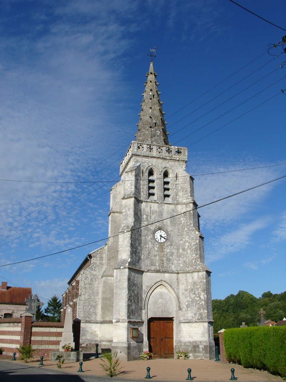 L'église d'Affringues et le monument aux morts